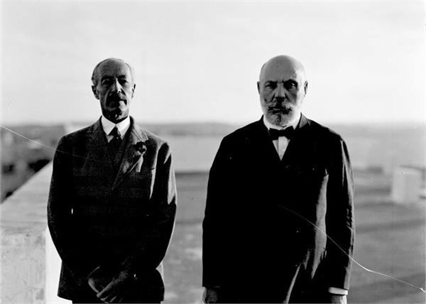 גניגר - הנציב העליון ווקופ ומנחם אוסישקין.